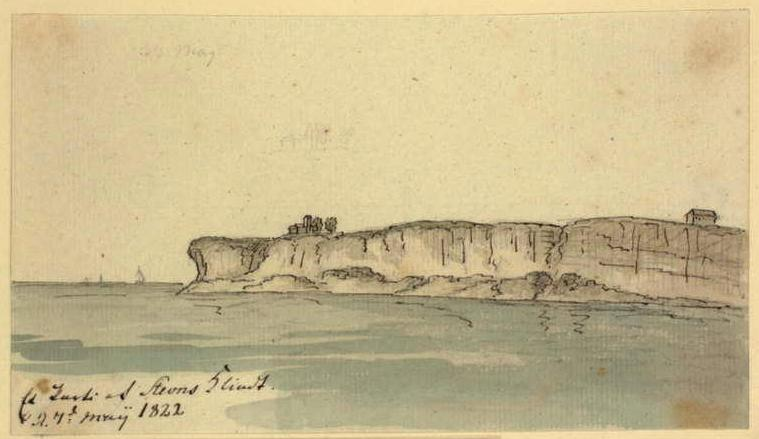 Et Parti af Stevns Klint d 7 May 1822, Udgivet: 1822, Omfang: 92 x 163 mm : Akvarel, Stevns Klint - Danmark, Rawerts maleriske Reise III, 36 c